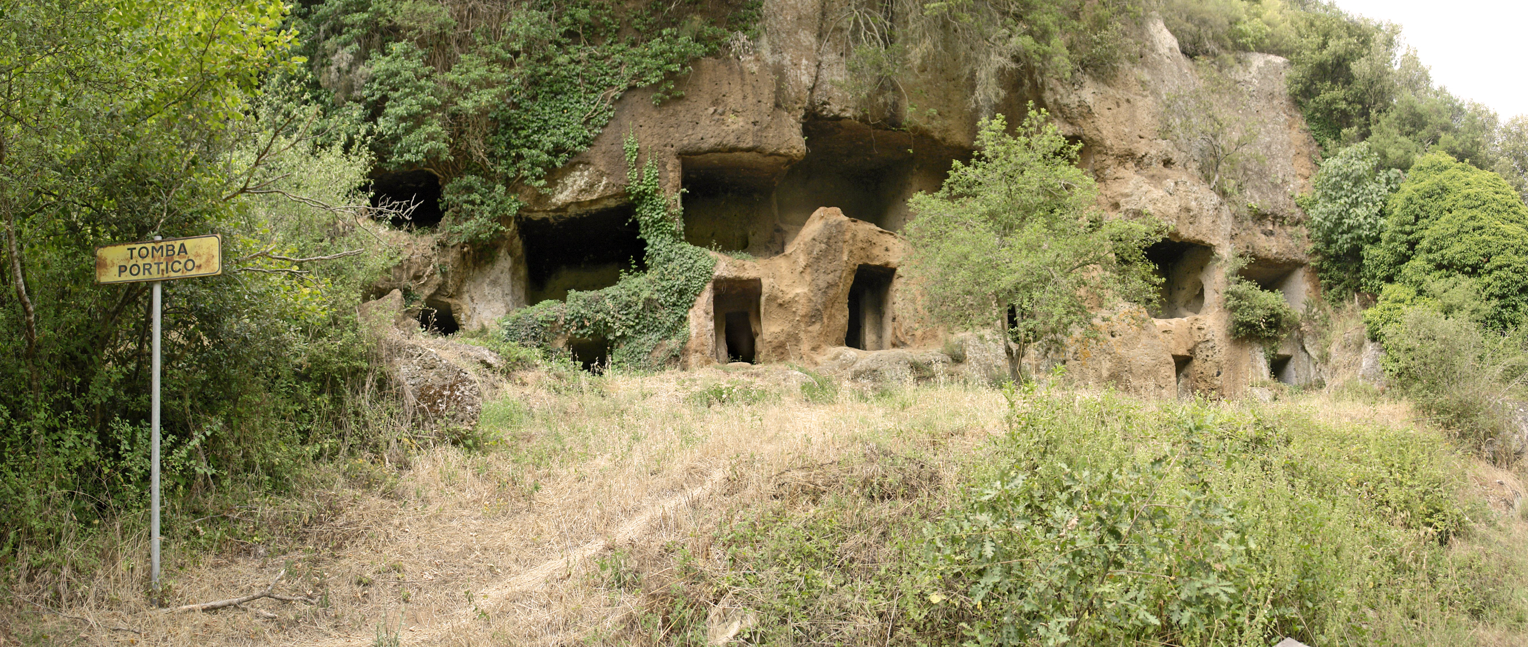 Etruskische Nekropole San Guliano